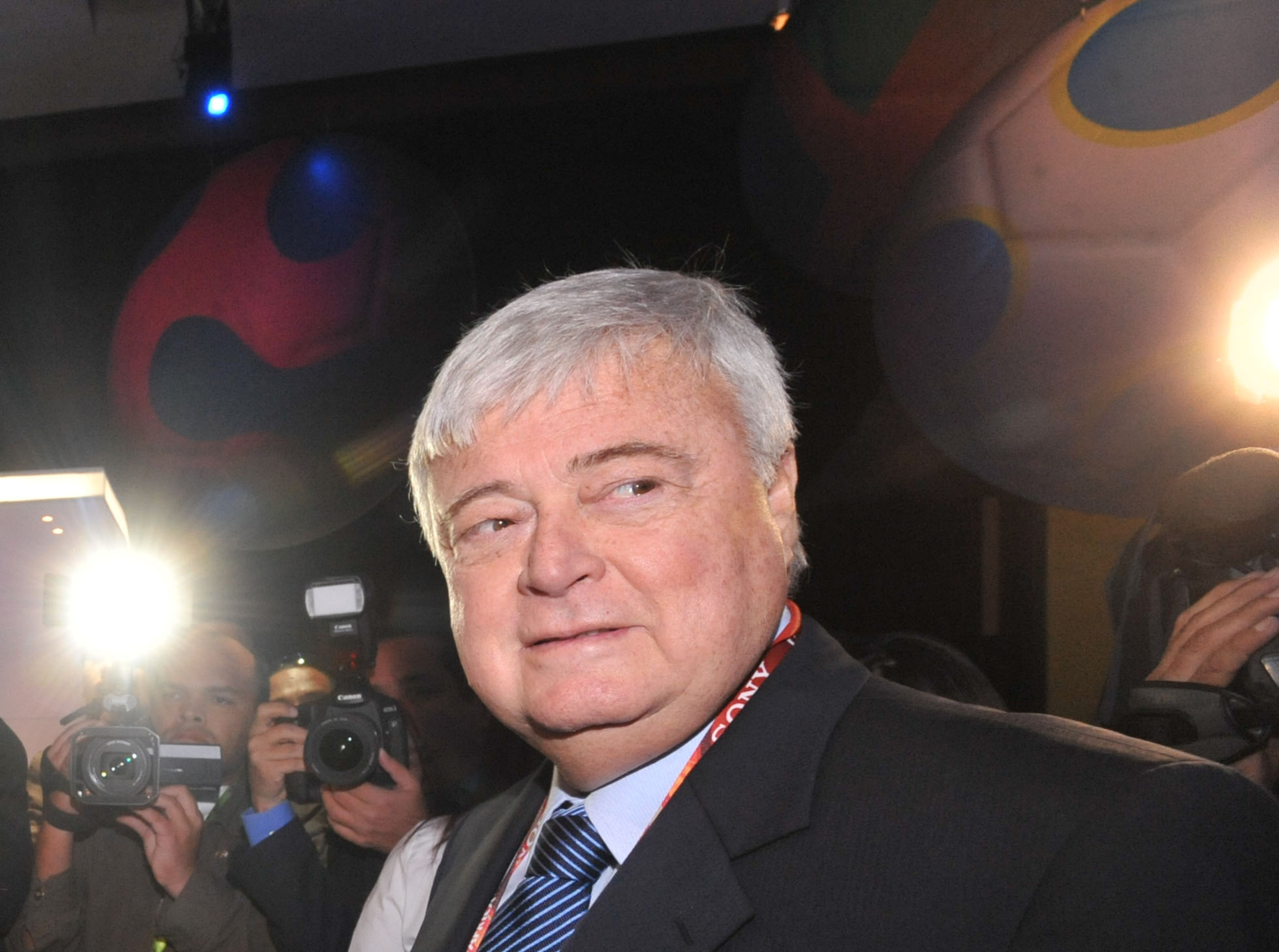 Joanesburgo (África do Sul) - O presidente da CBF, Ricardo Teixeira, na abertura da exposição que divulga o Brasil como país-sede da Copa do Mundo de 2014.